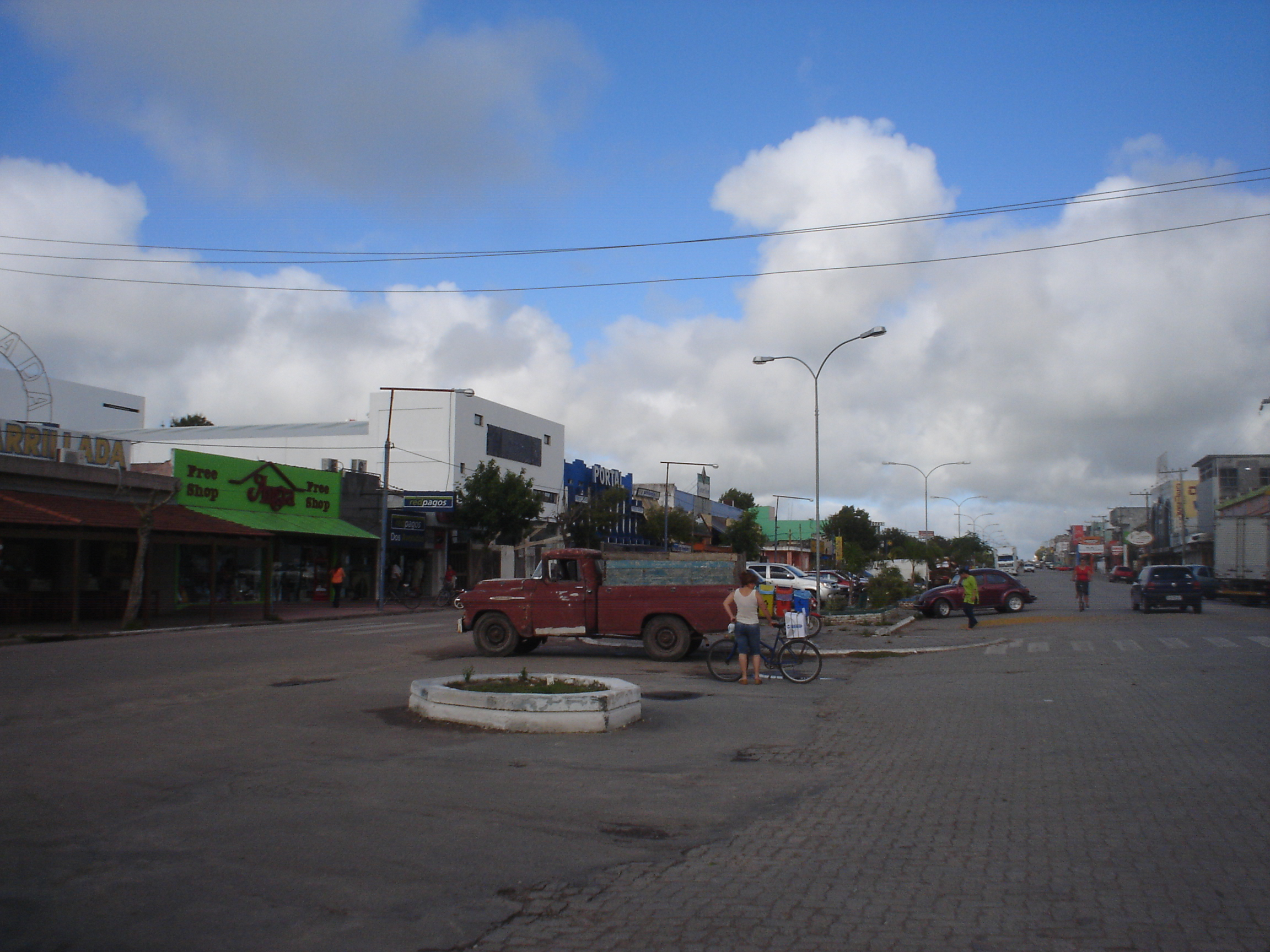 Avenida Uruguai / Avenida Brasil no Chuí